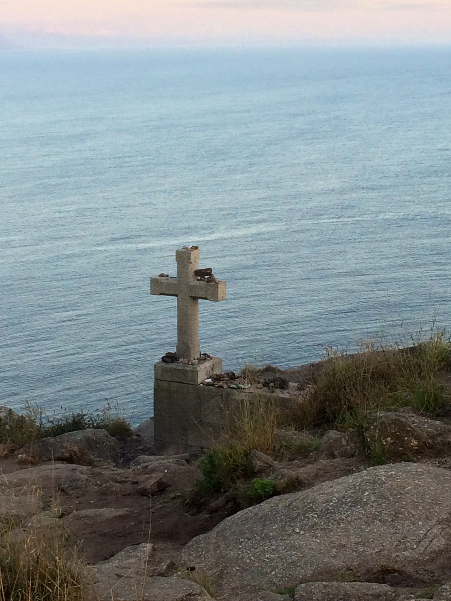 La croce a Finsiterre dove i Pellegrini lasciano una pietra